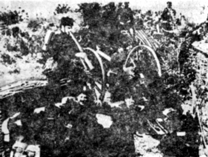 Frame from Independenţa României film (1912). The battle